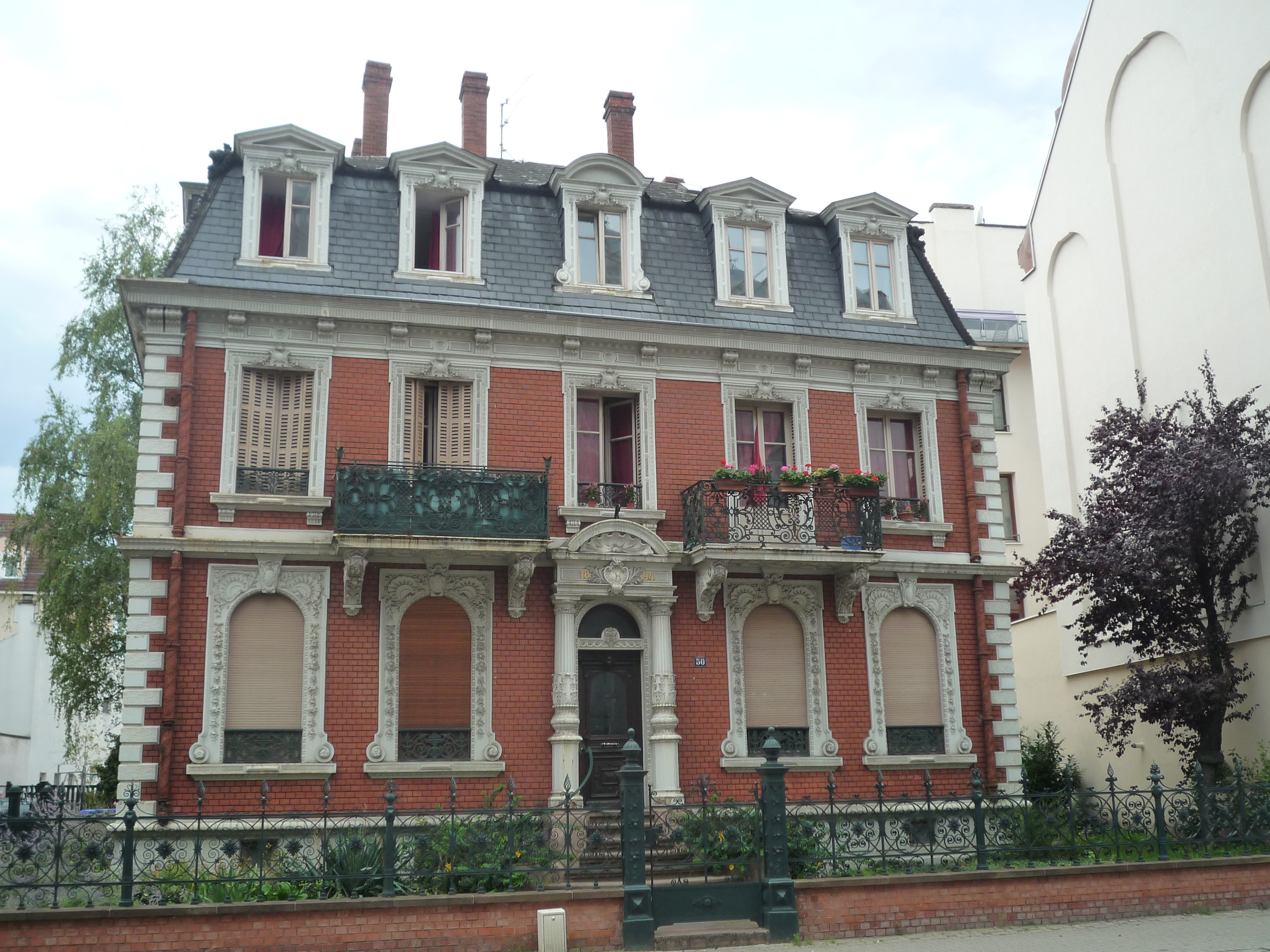 Maison Bowé, située au 50 route du Polygone à Strasbourg, construite en 1894 par l'architecte Philippe Bowé.